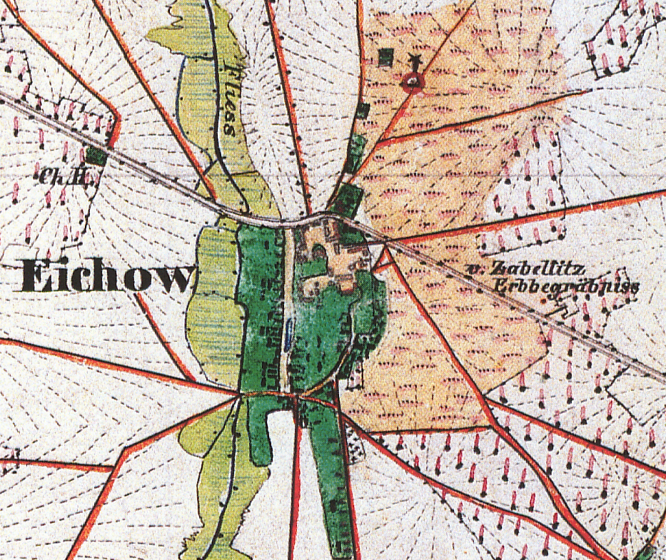 Eichow, Ortsteil der Gemeinde Kolkwitz, Landkreis Spree-Neiße, Brandenburg, Ausschnitt aus dem Urmesstischblatt 4250 Vetschau